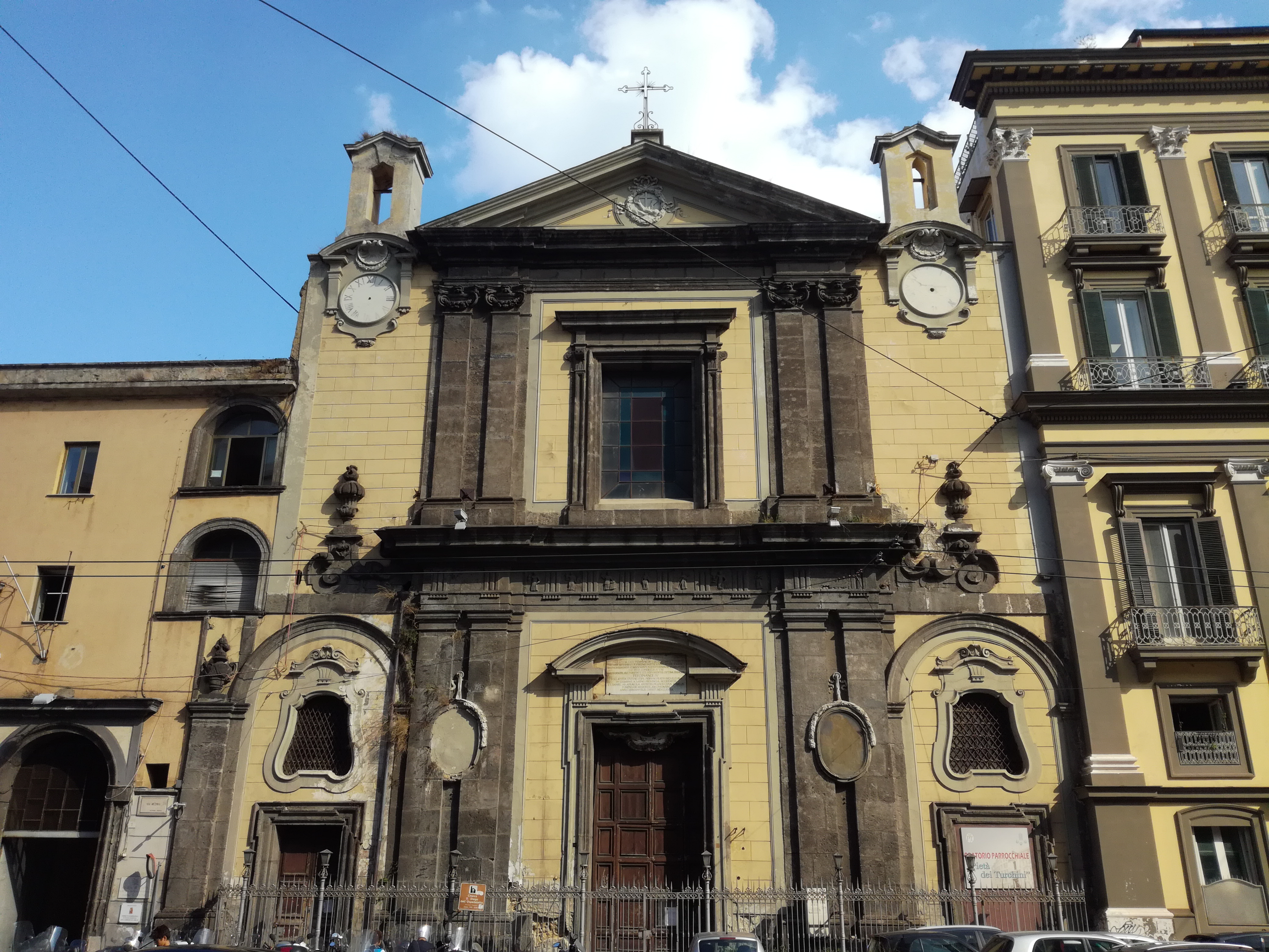 Facciata, Chiesa San Diego all'Ospedaletto (Napoli)